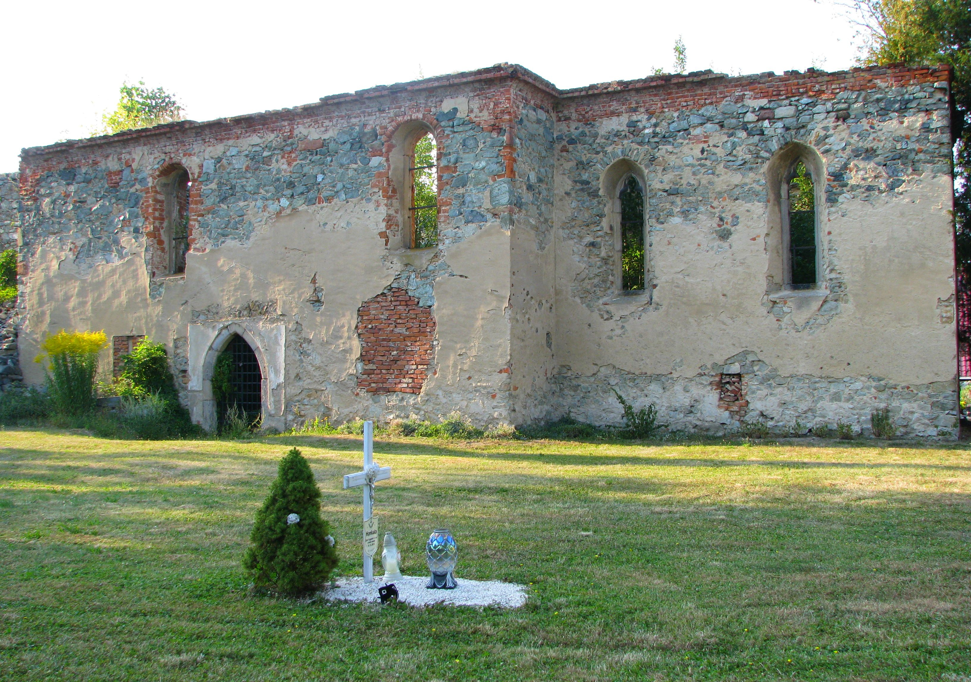 Nasławice, gmina Sobótka